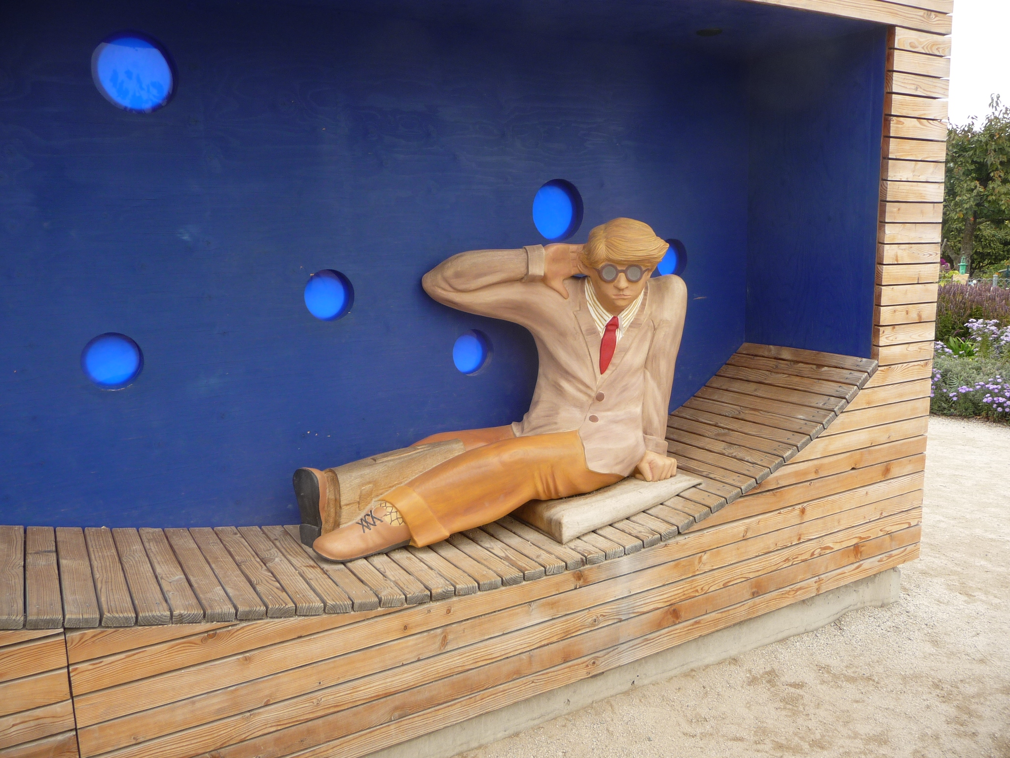 Die Landesgartenschau Bamberg 2012 war die 16. bayerische Landesgartenschau undkonzentrierte sich auf das Gelände der ehemaligen Textilfabrik ERBA im Bamberger Stadtteil Gaustadt.